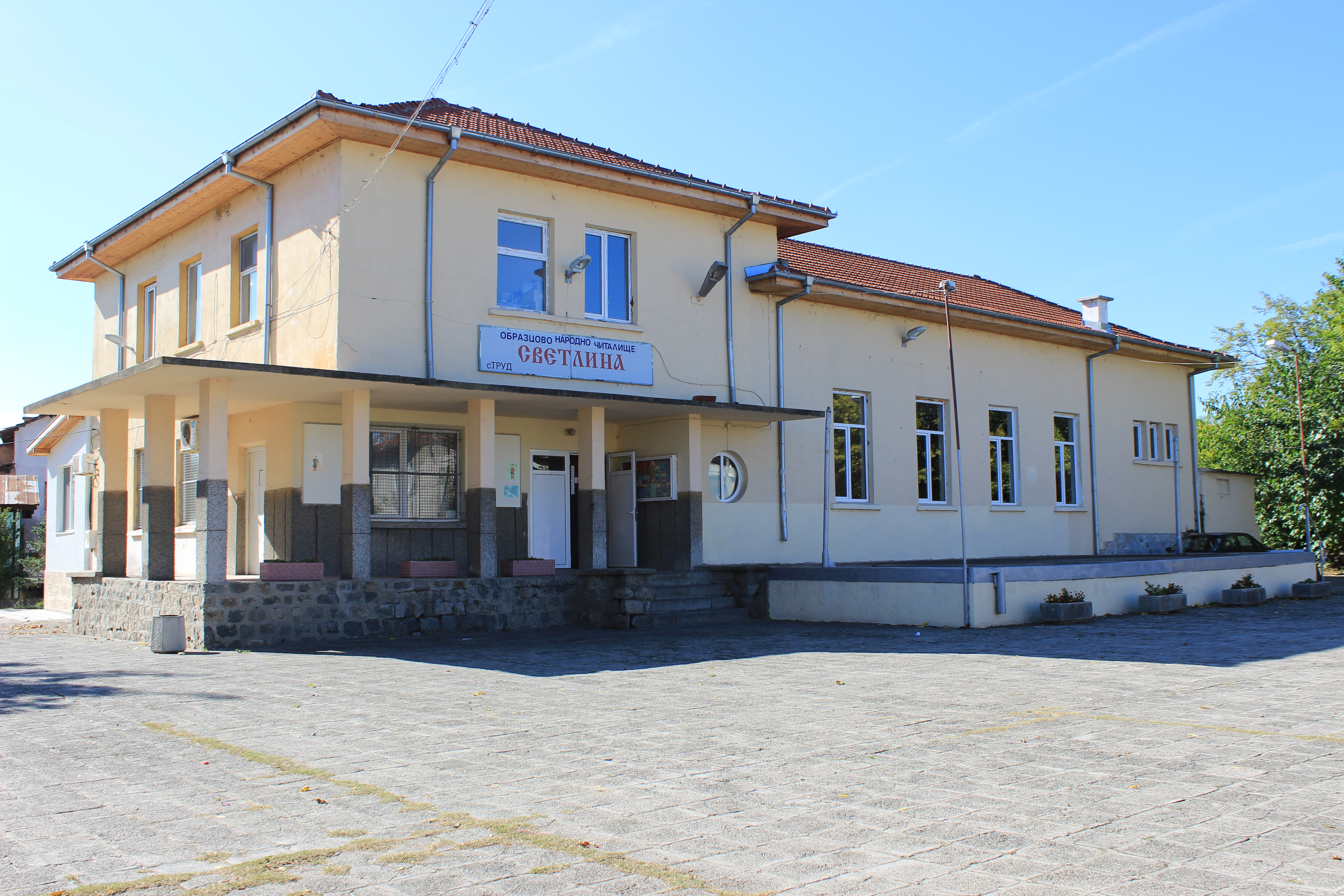 Читалище „Светлина 1929“ в село Труд, Община Марица, Област Пловдив